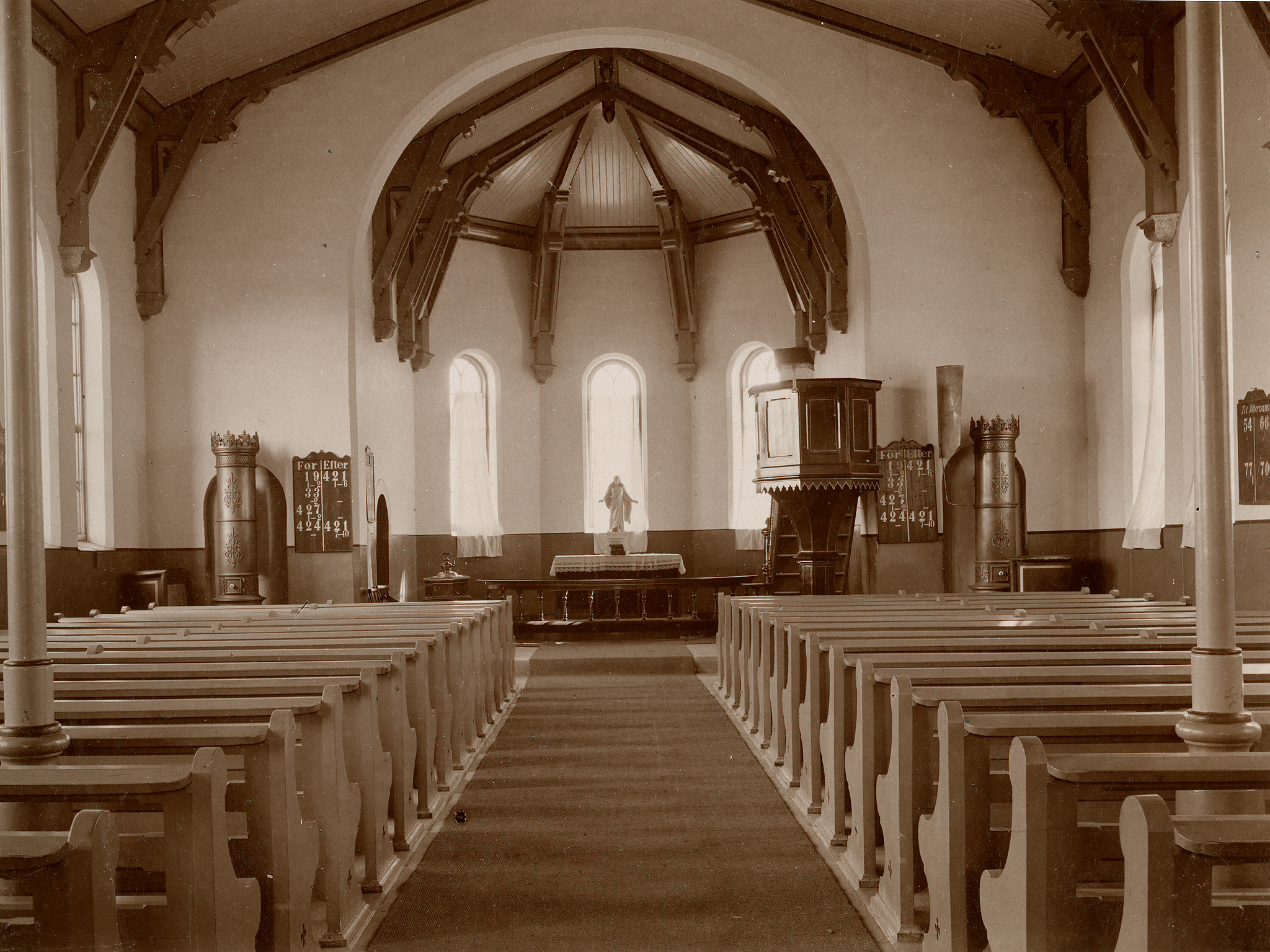 Interiør i Råholt kirke før korvinduene fikk glassmalerier. Fra Kulturminnebilder.no.